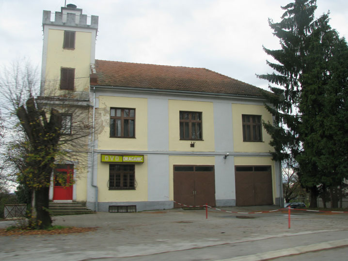 Zgrada DVD Draganić